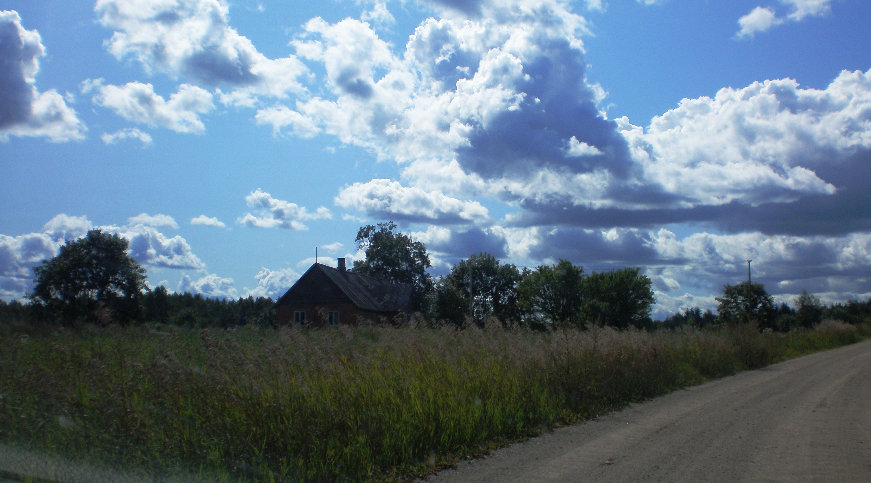 Žagariai, Zarasų raj., Lietuva